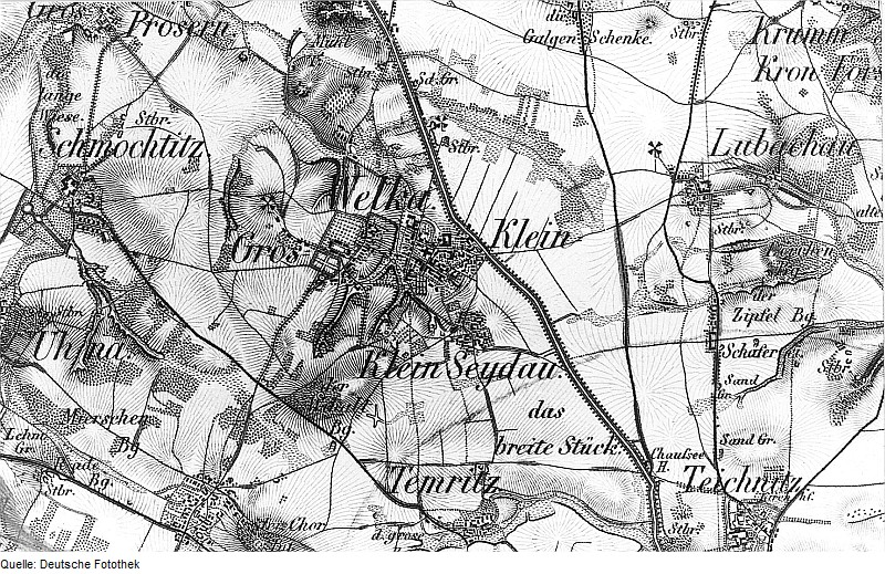 Original image description from the Deutsche Fotothek Bautzen-Großwelka. Oberreit, Sect. Bautzen, 1844/46